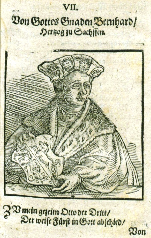 Bildnis des Herzogs von Sachsen Bernhard II. († 1059)